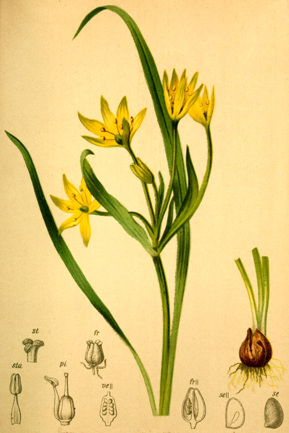 Gagea liottardii